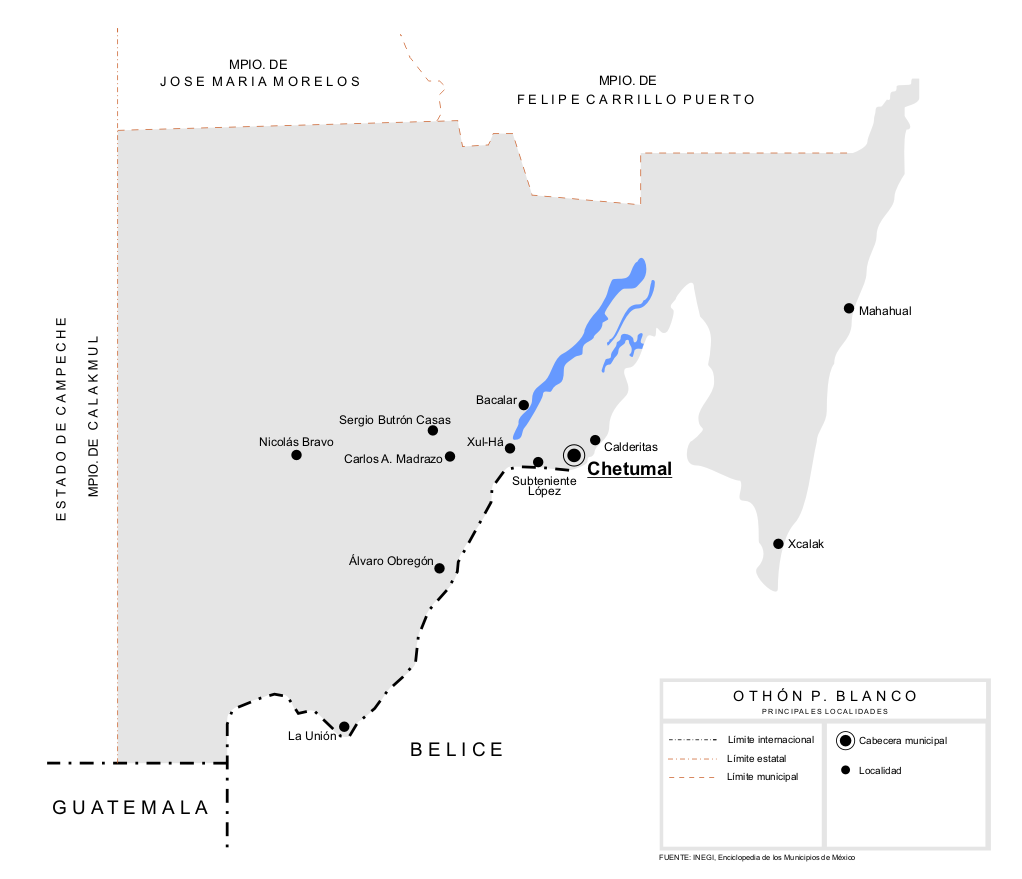 Mapa de las principales localidades del Municipio de Othón P. Blanco en el estado de Quintana Roo, México.